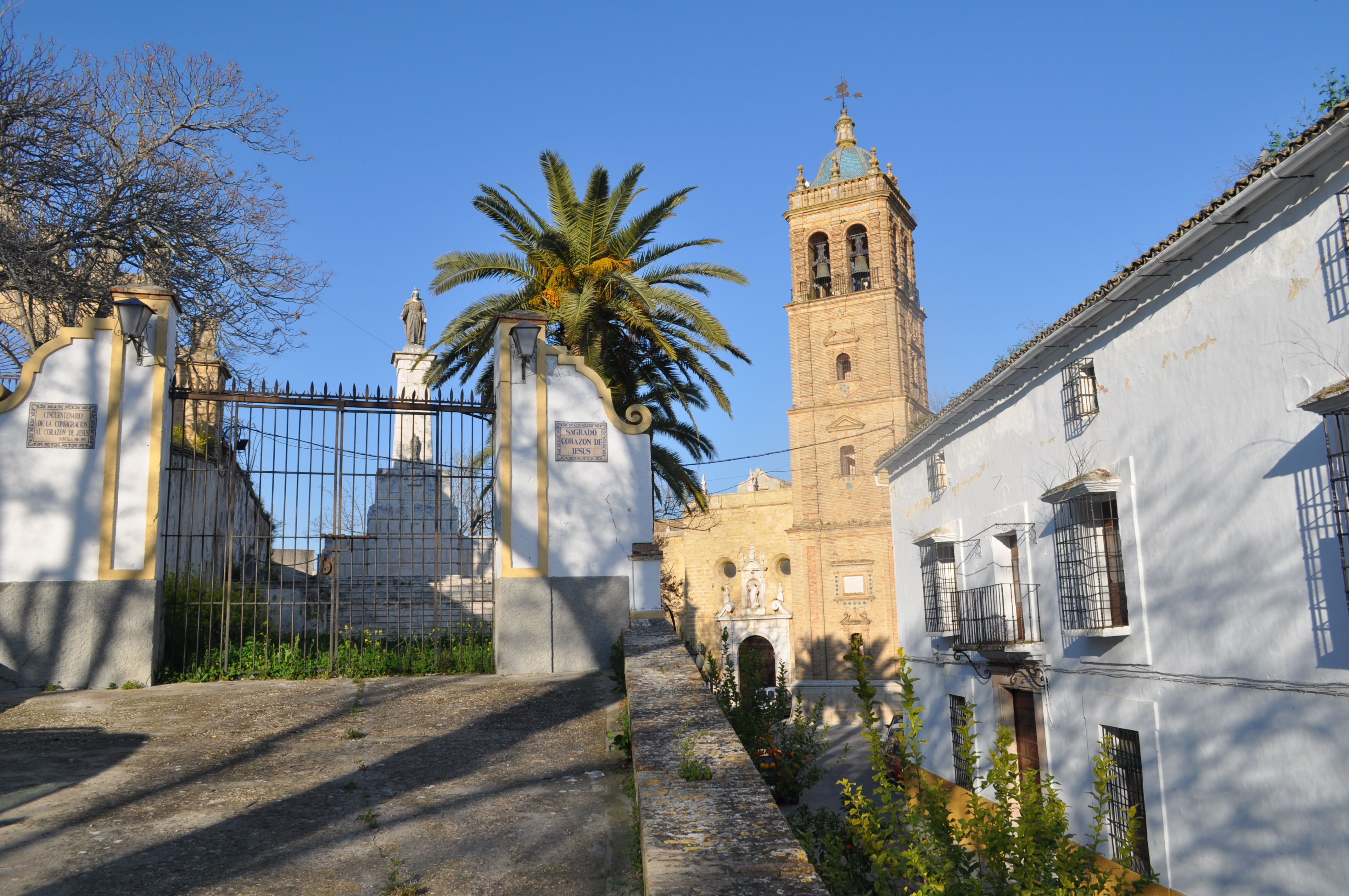 Declarada Bien de Interés Cultural el día 30 de abril de 2001, esta iglesia se construyó con los restos del desaparecido castillo de Montilla.